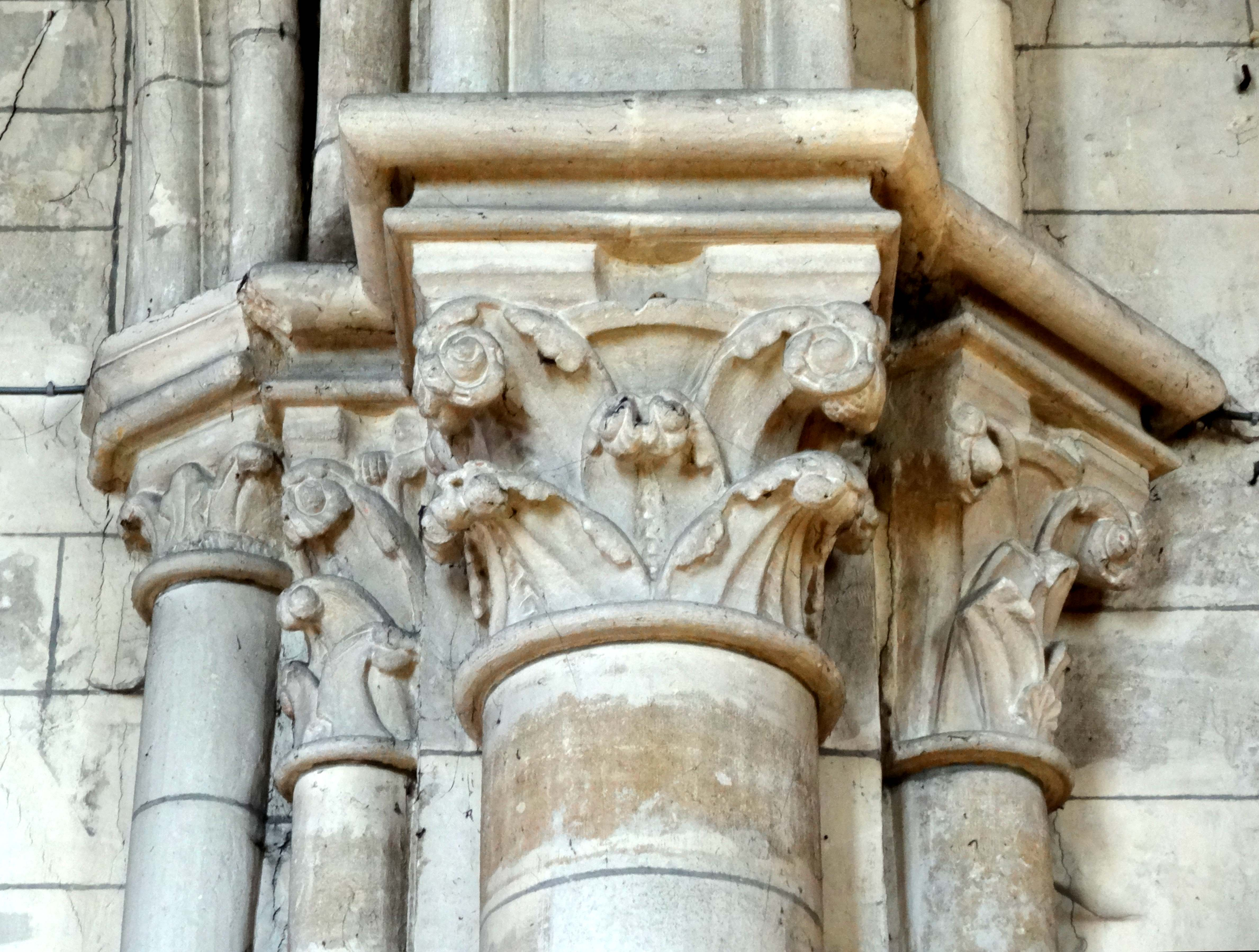 Chapiteaux - voir titre.